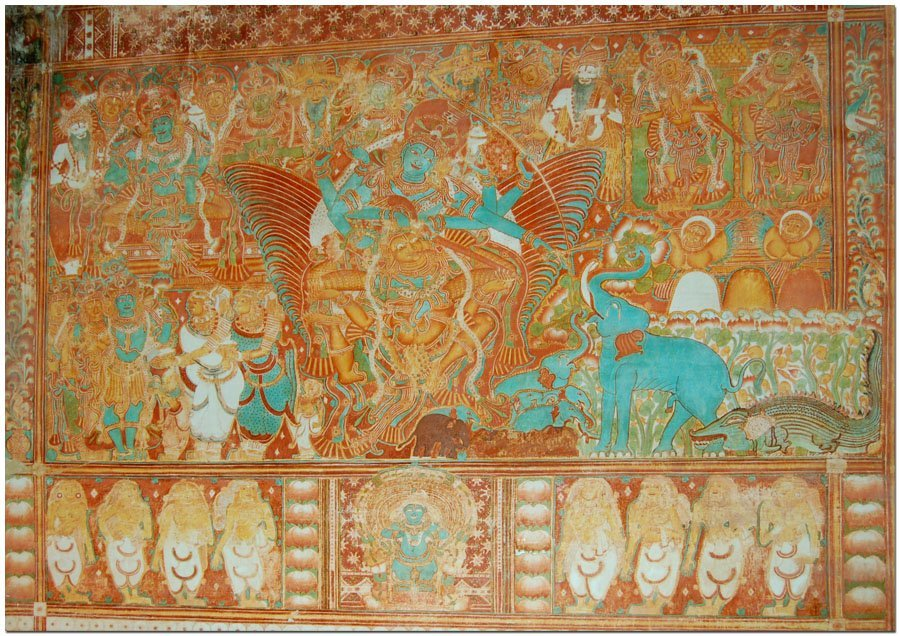 Gajendramoksham painting at Krishnapuram Palace